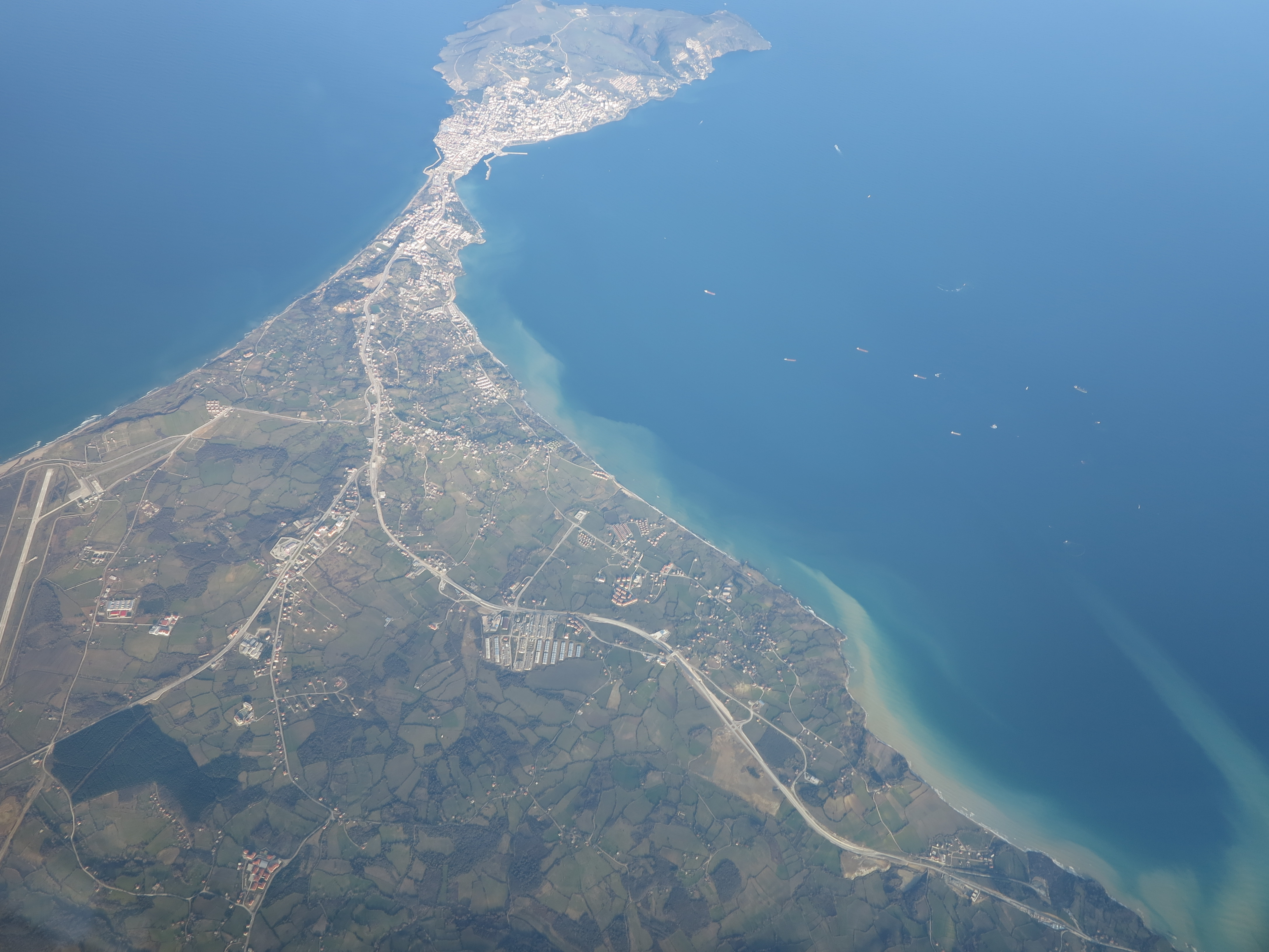 SINOP 17.057 Feet